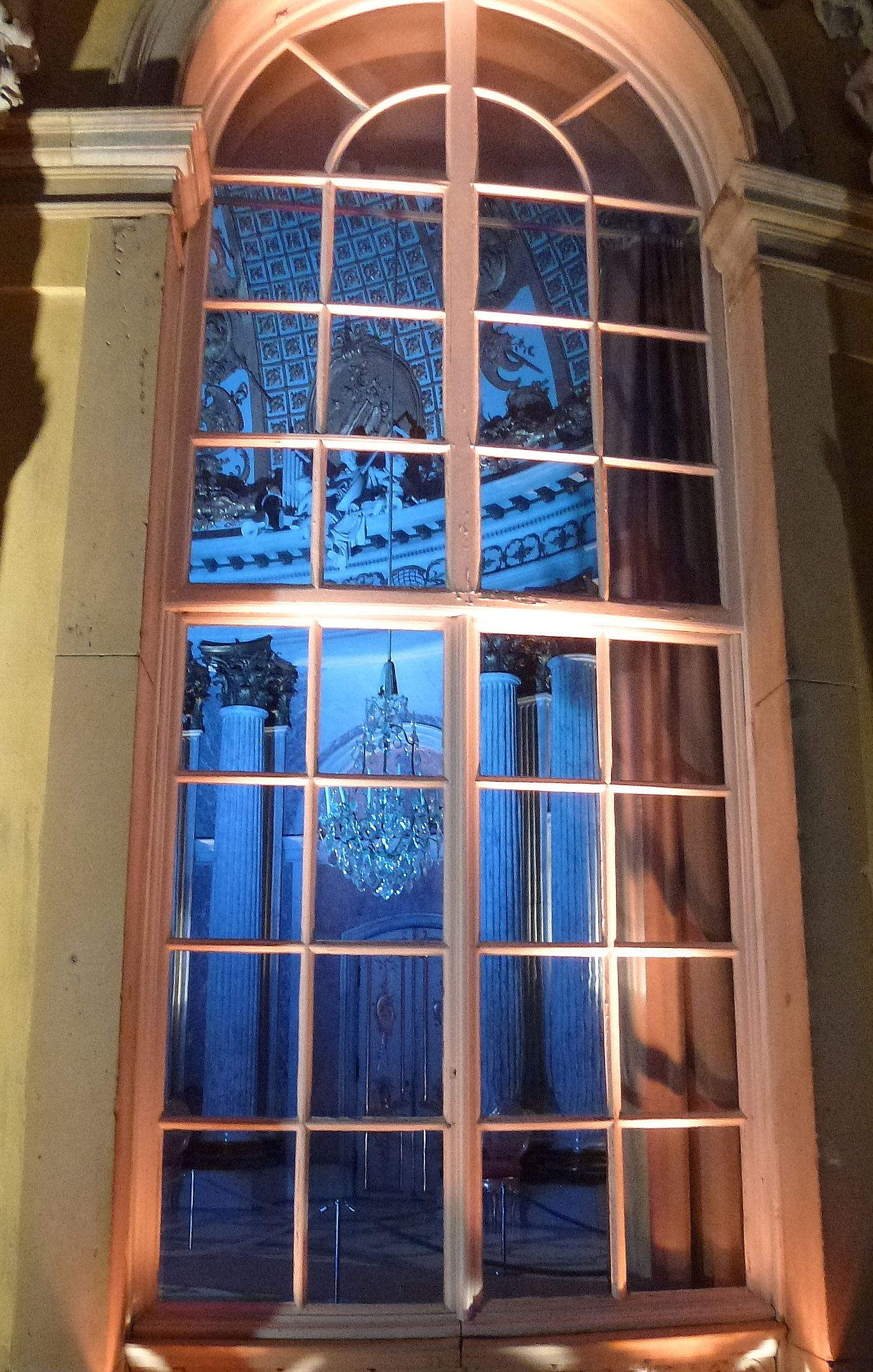 Schloss Sanssouci Mittelteil bei Nacht, Blick in den Marmorsaal